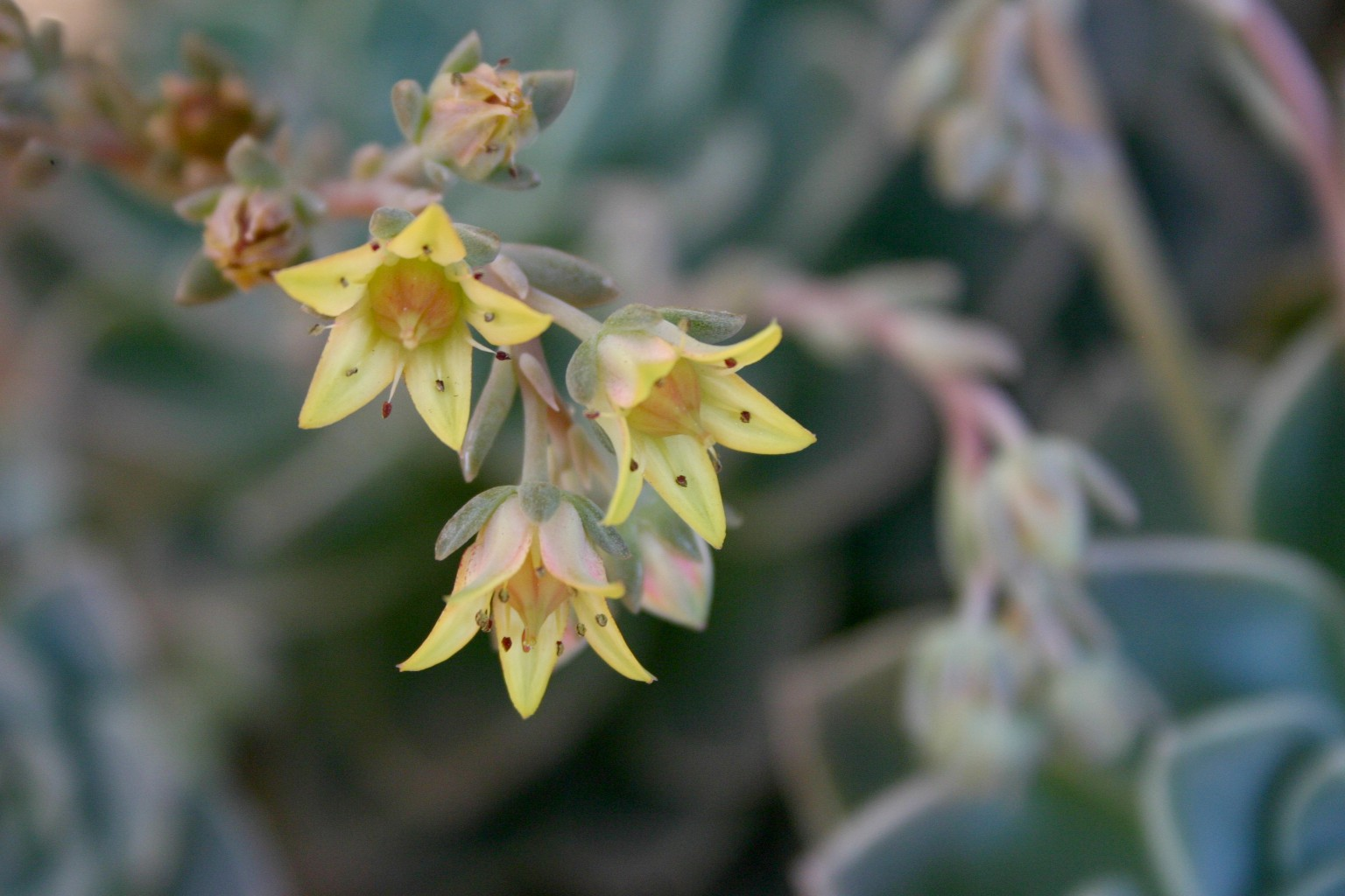 Echeveria